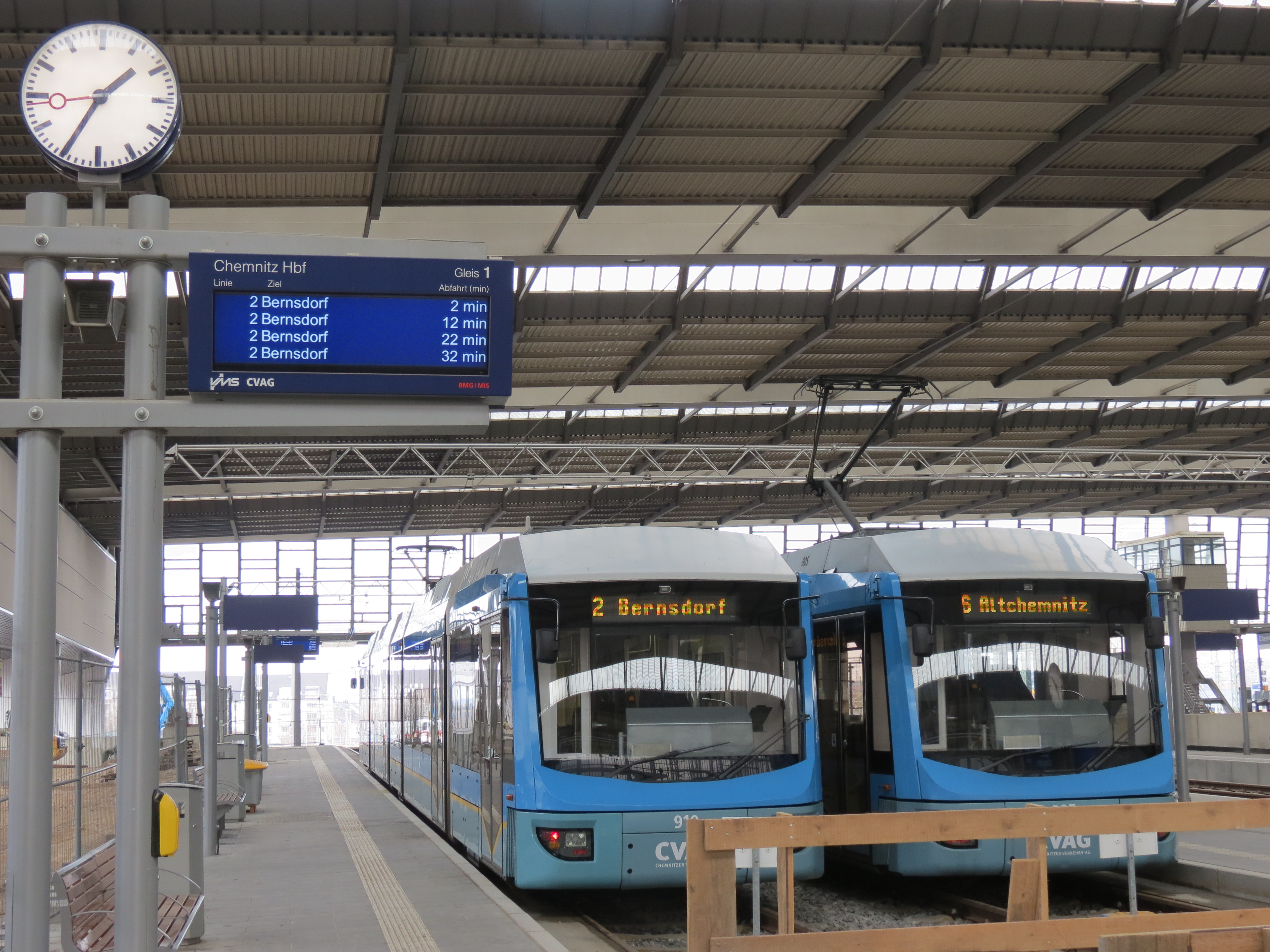 Dynamische Anzeigen am Bahnsteig 1 des Chemnitzer Hauptbahnhofs